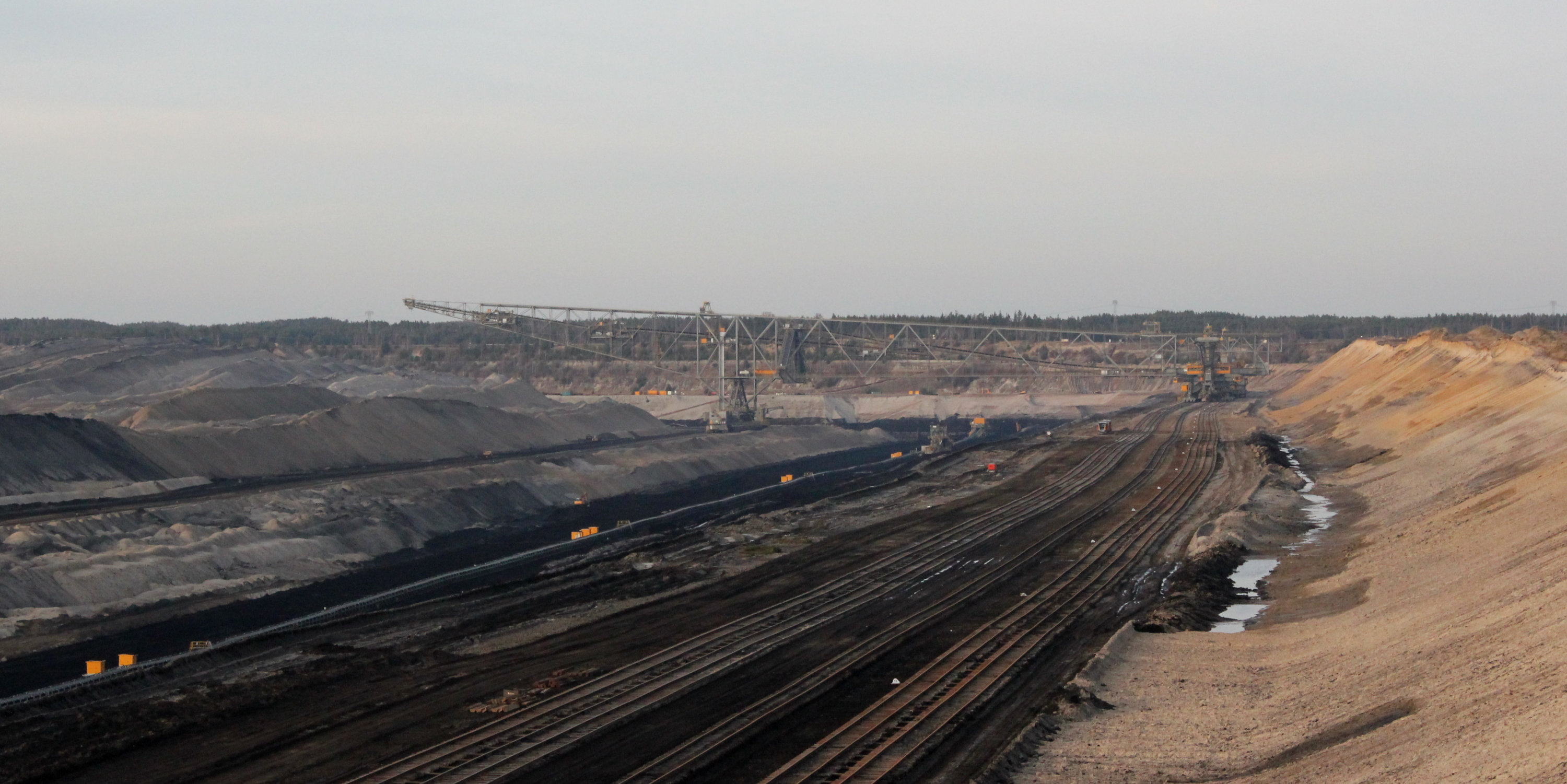 Blick in den Tagebau Reichwalde. Hornjoserbsce: Wid do Rychwałdskeje jamy.